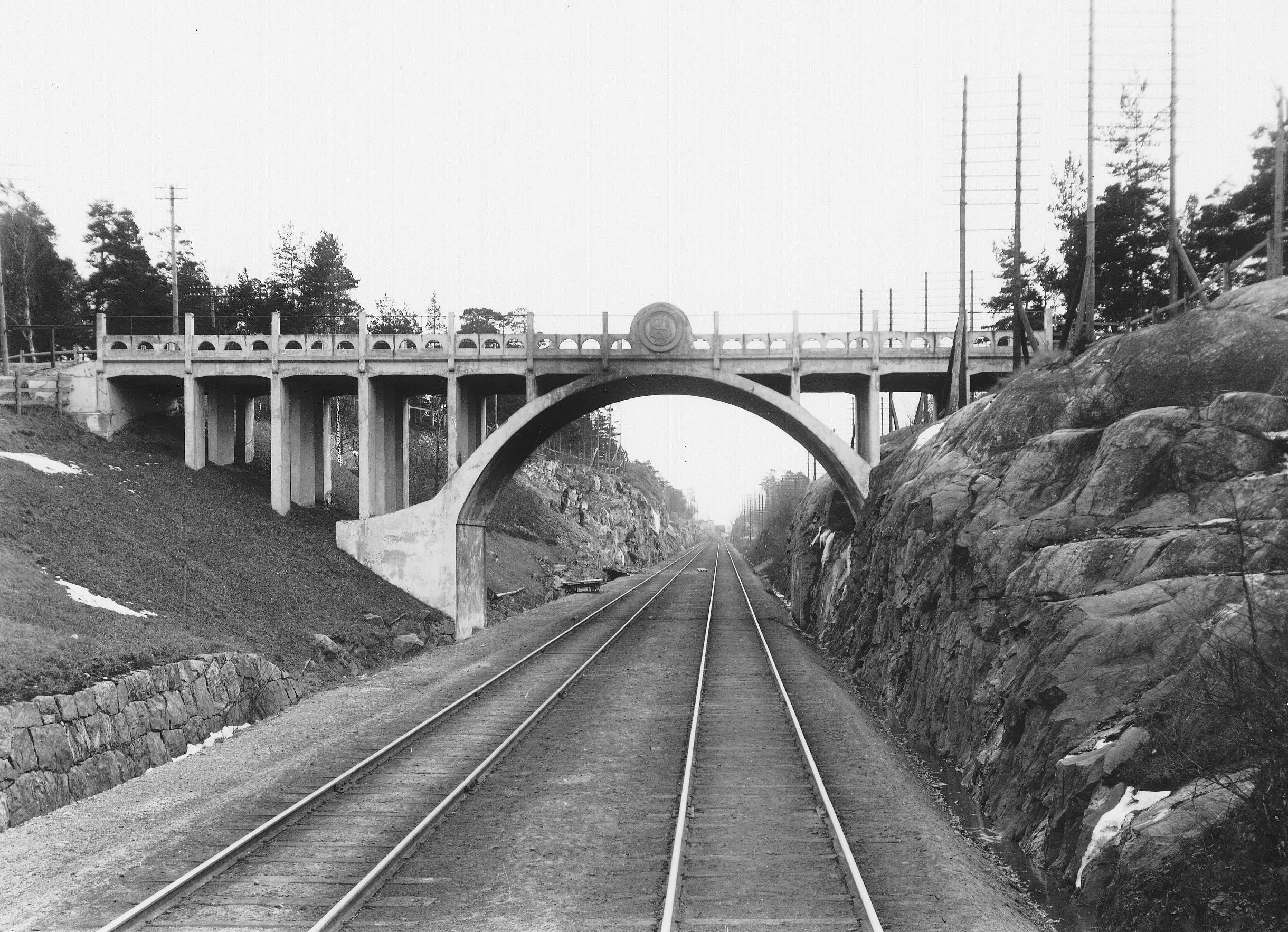 Järnvägsbron över stambanan i Västberga före 1922